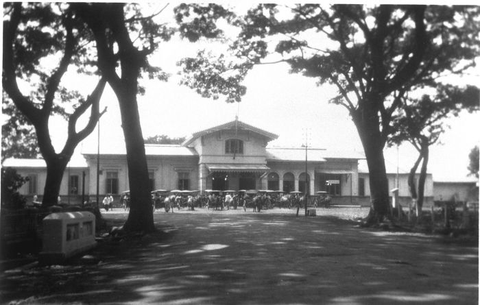 Foto. Het stationsgebouw te Bondowoso op Oost-Java